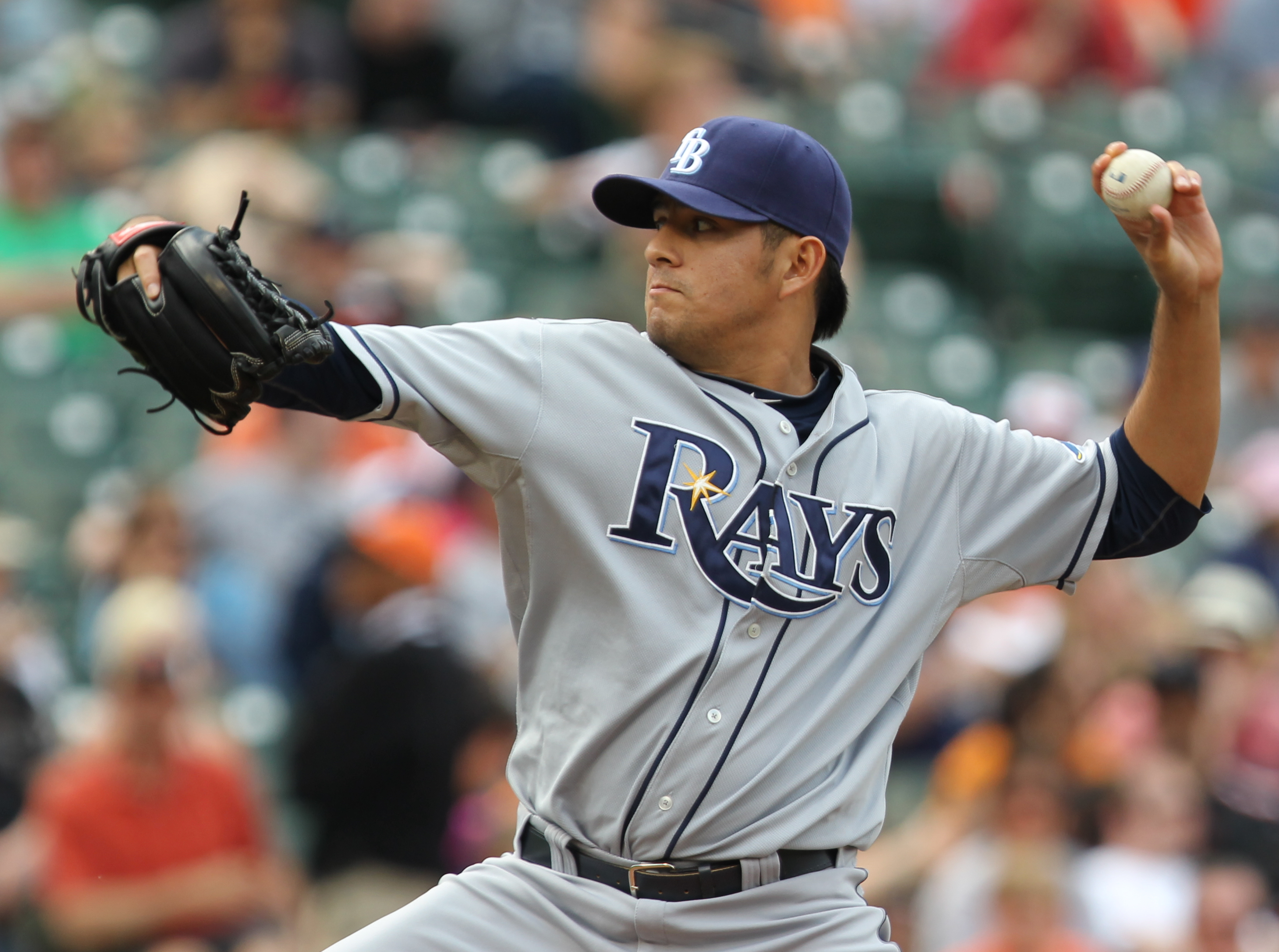 Cesar Ramos